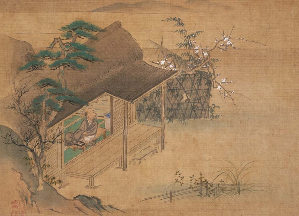 Scroll by Sumiyoshi Gukei 徒然草画帖